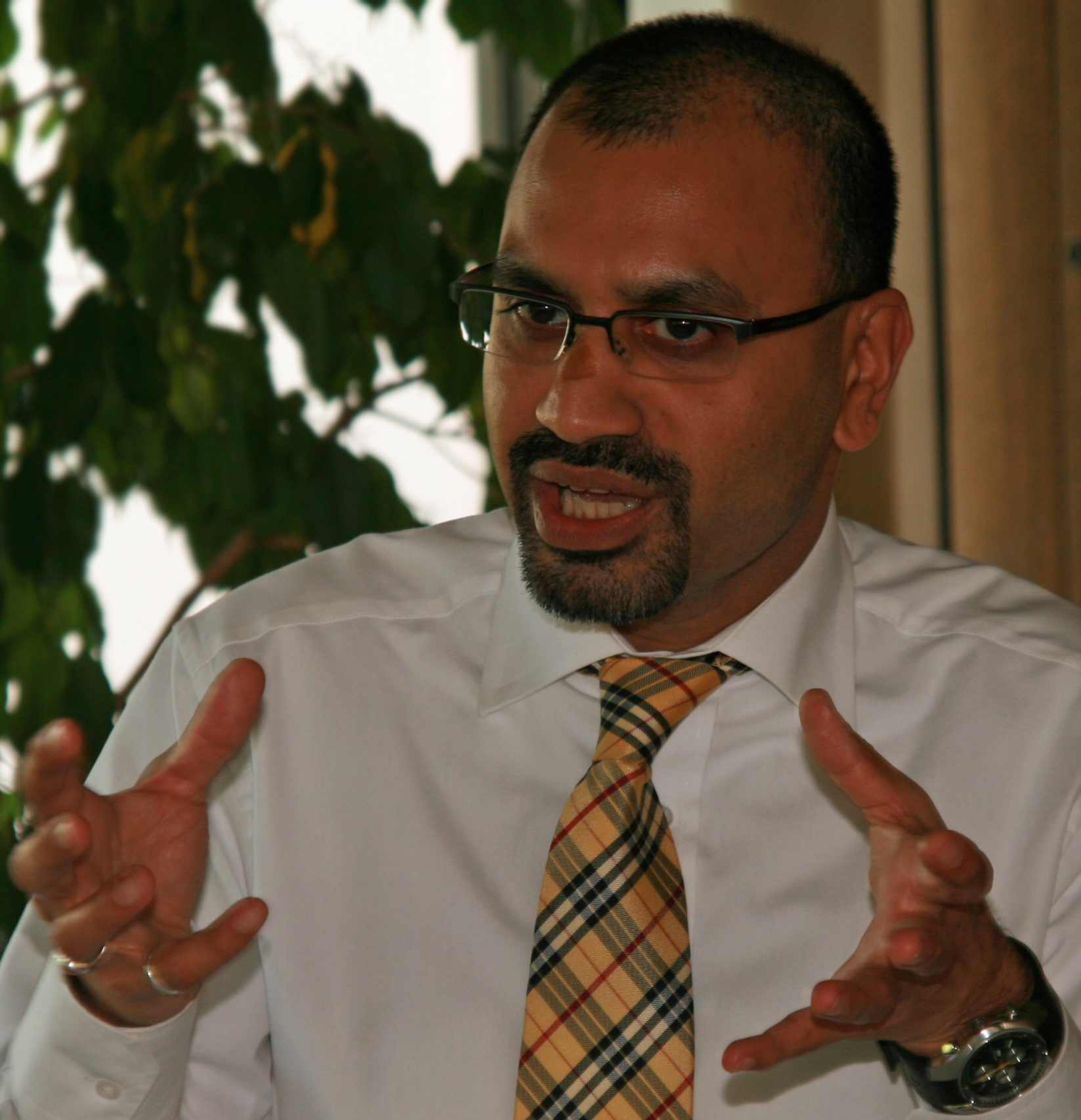 Joybrato Mukherjee (* 29. September 1973), Anglist, Präsident der Justus-Liebig-Universität Gießen, Vizepräsident des Deutschen Akademischen Austauschdienstes (DAAD)